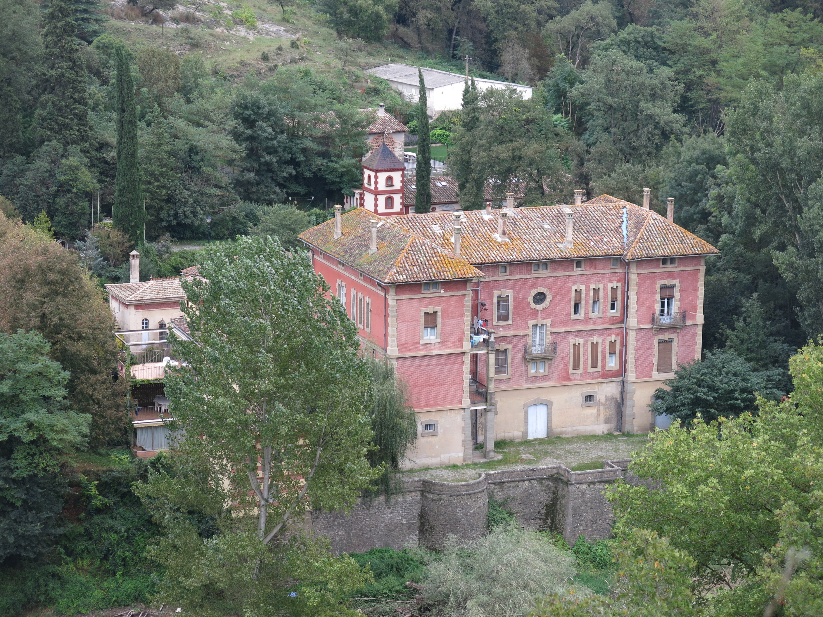 Castellnou, Colònia Salou (les Masies de Roda), des de l'Esquerda